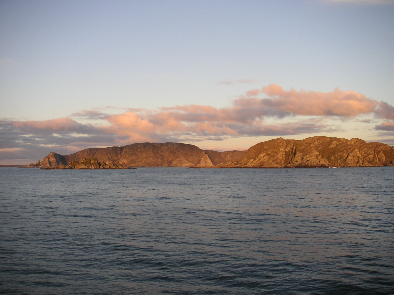 Coast in Norge, Fylke Finnmark